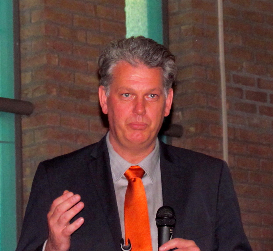 Hero Brinkman, onafhankelijk lid van de Tweede Kamer (ex-PVV) en oprichter van de Onafhankelijke Burger Partij, tijdens een debatavond van de SGP-jongeren in Apeldoorn